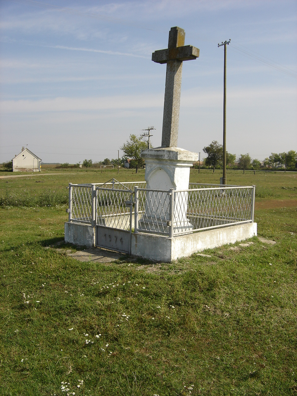 Majške Međe, pravoslavni križ